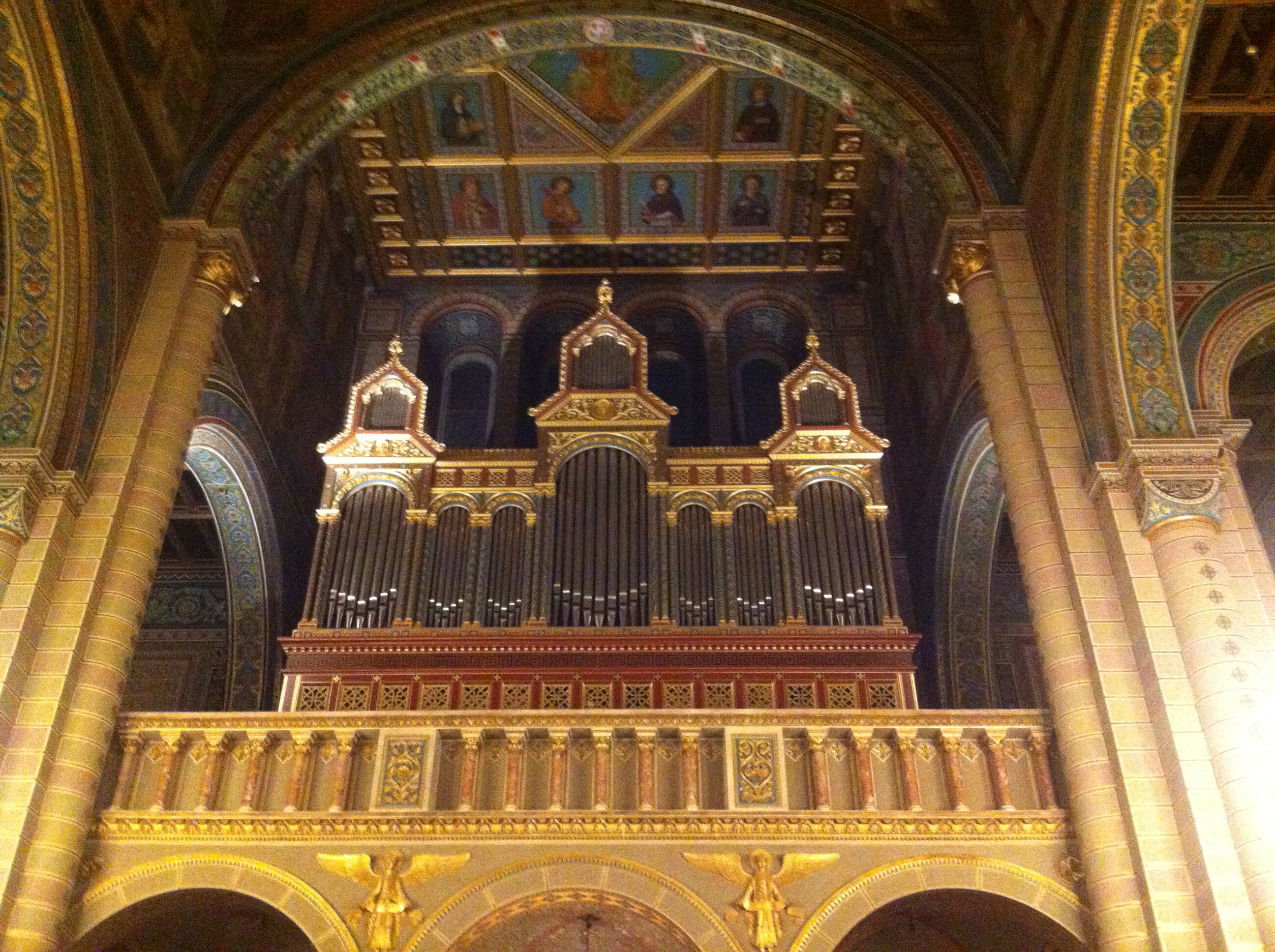 A Pécsi Székesegyház négy manuálos, több mint 6000 síppal rendelkező orgonája (Pécs, Szent István tér 23.)